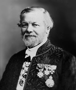 French geologist and mineralogist Achille Delesse (1818-1881)